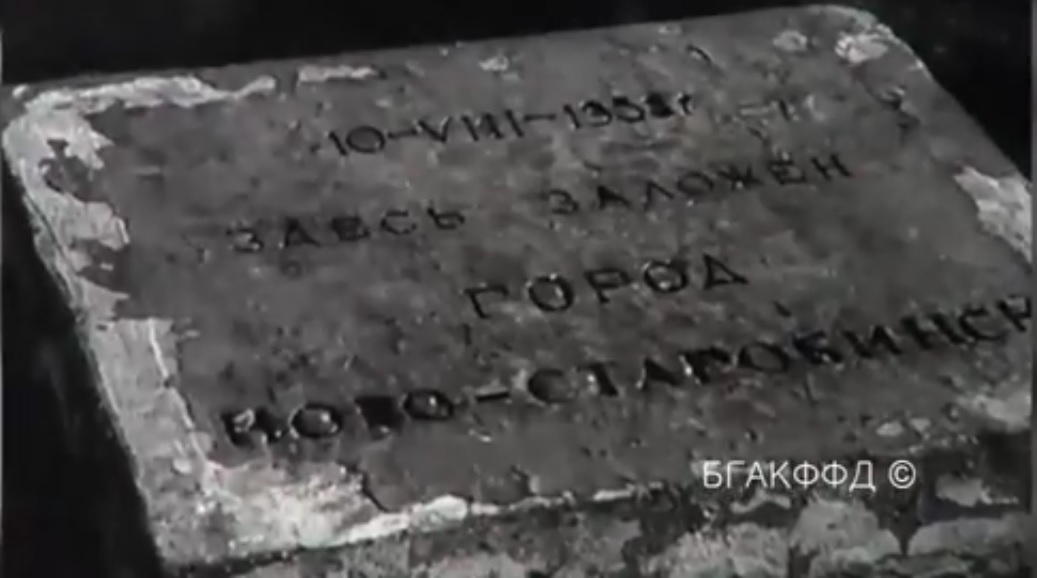 Беларуская (тарашкевіца): Гістарычны камень зь першым назовам м. Салігорску